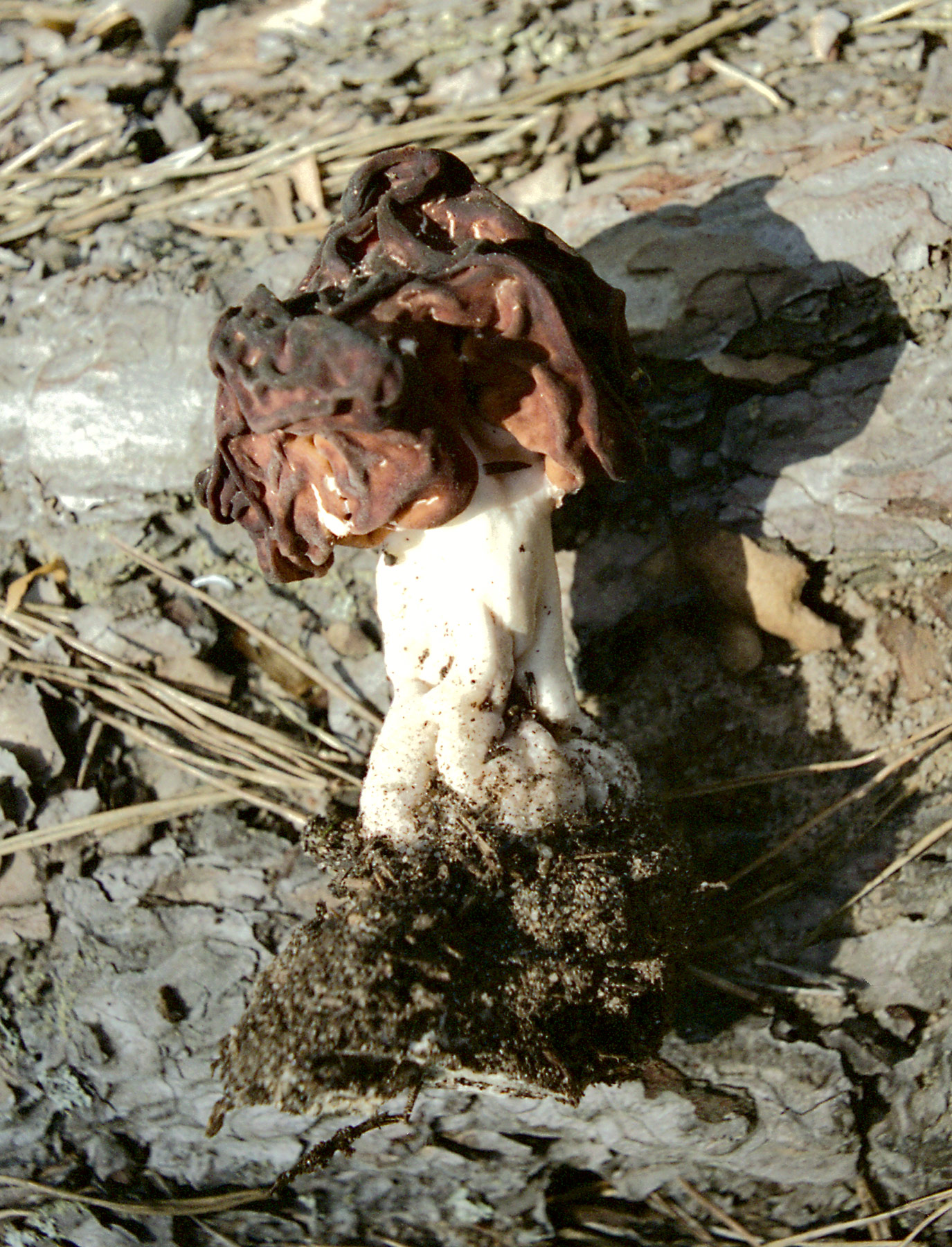 Gyromitra esculenta, pine forest in Puscha-Voditsa near Kiev, Ukraine